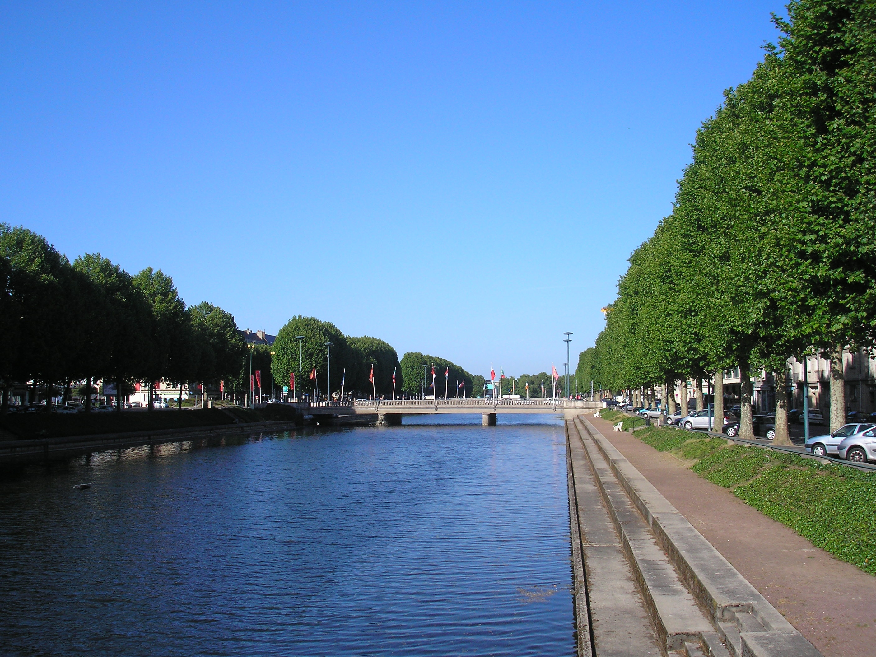 Caen (Normandie, France). L'Orne, en rive droite.